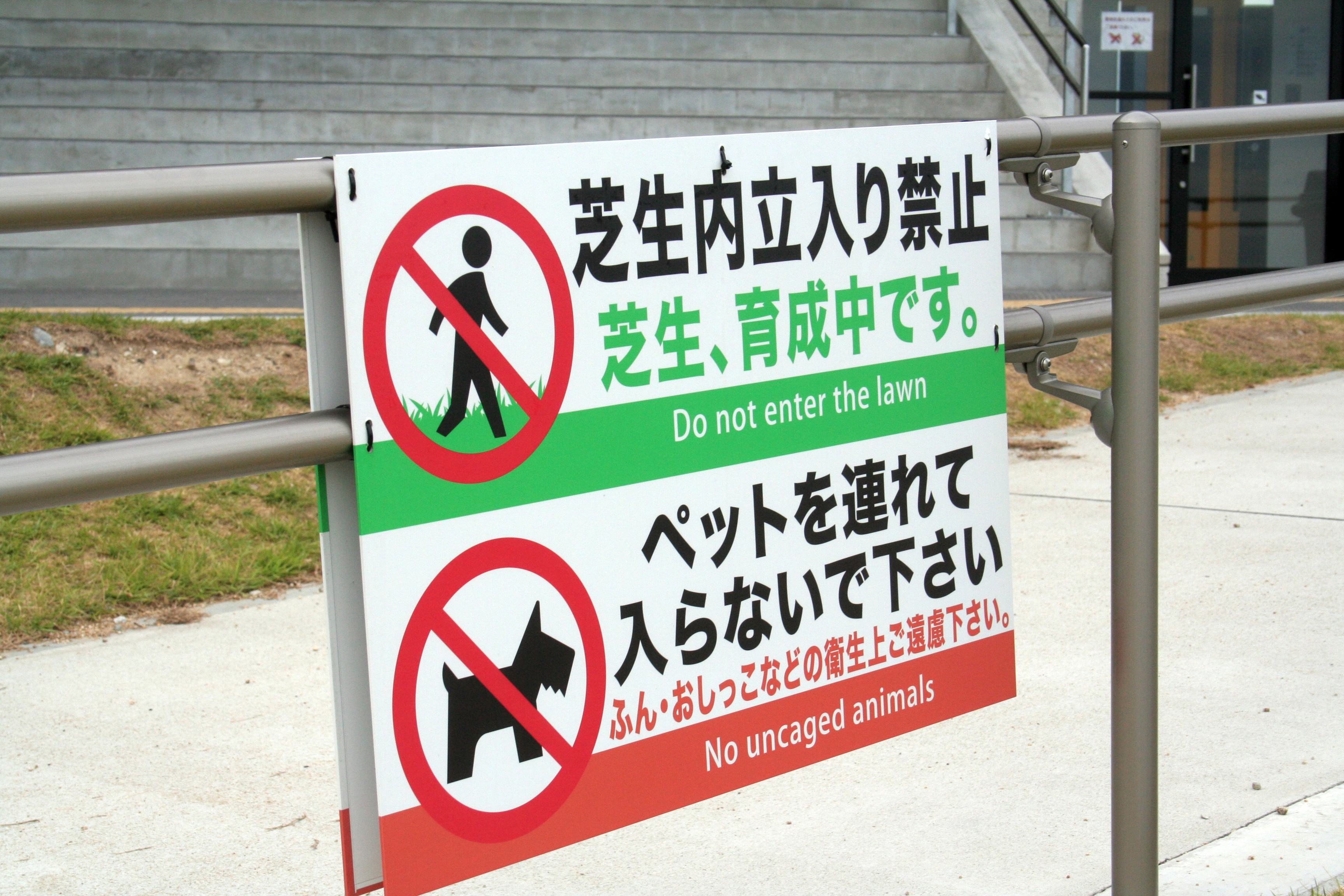 道の駅みつ。兵庫県たつの市御津町にある道の駅。国道250号線の七曲りと呼ばれる区域の側にある。 禁止警告板。